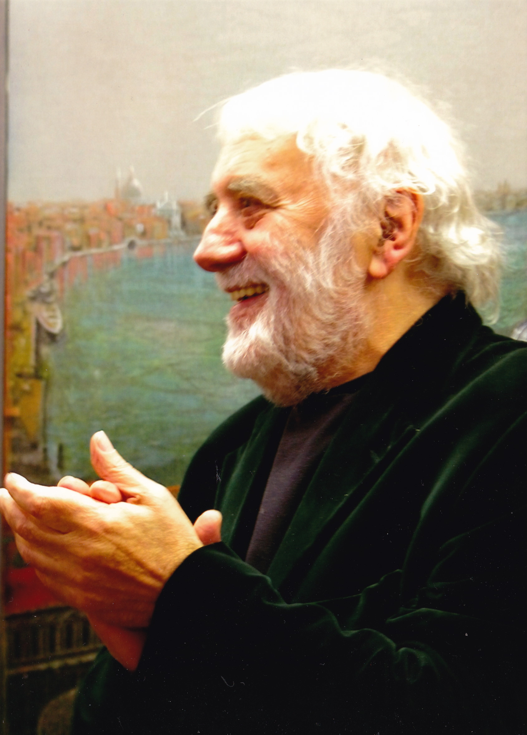 Il giornalista e critico d'arte